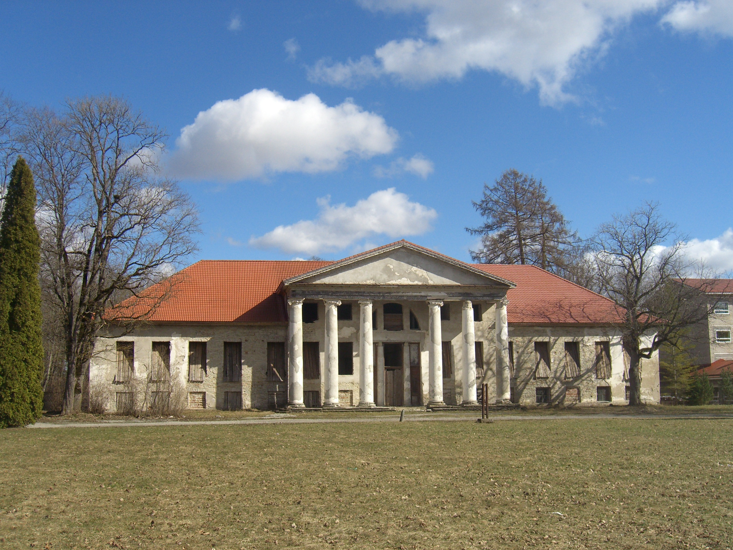 In Raplamaa